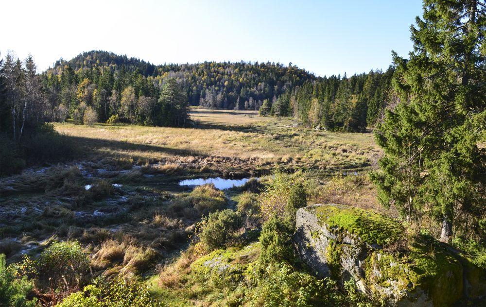 Elva naturreservat